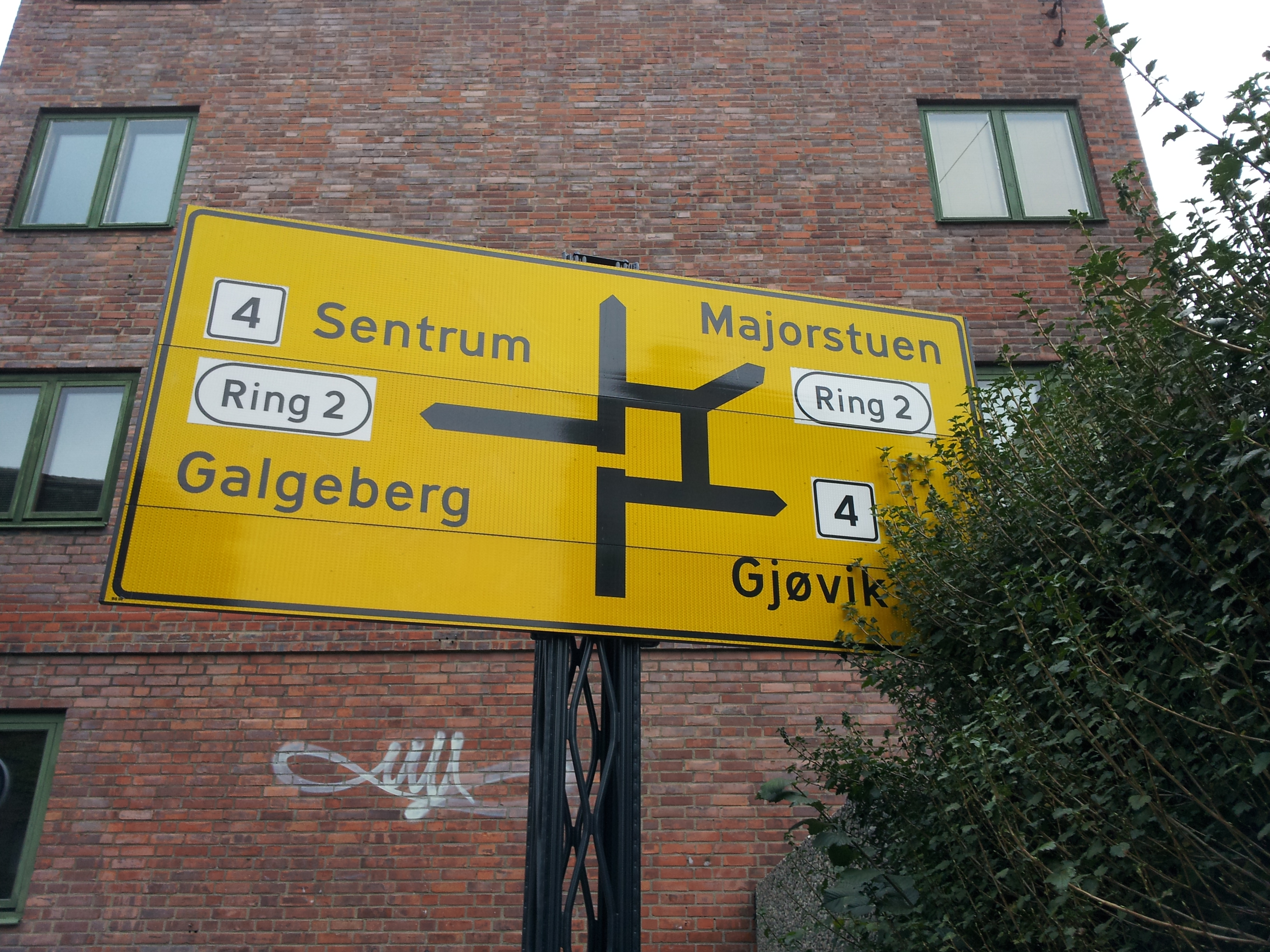 Skilt med oversikt over Carl Berner plass, stående i Grenseveien 100 meter øst for krysset.